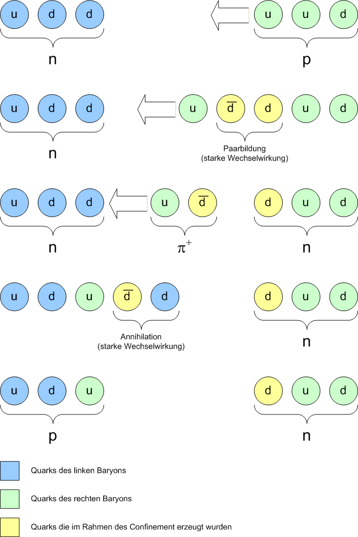 Proton (uud) und Neutron (udd) tauschen ein Pi-Meson aus